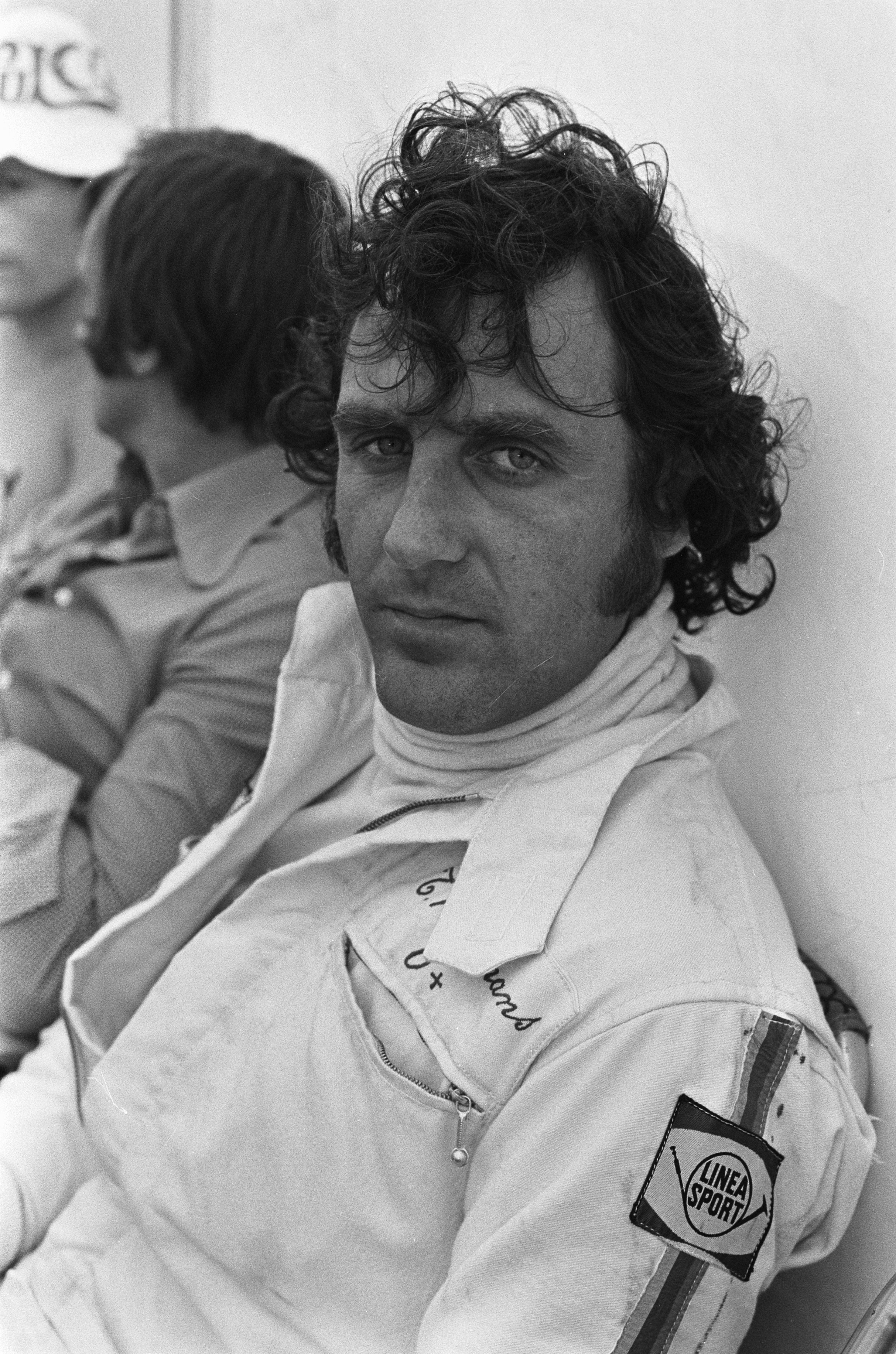 Toine Hezemans lors d'une course à Zandvoort en 1973.